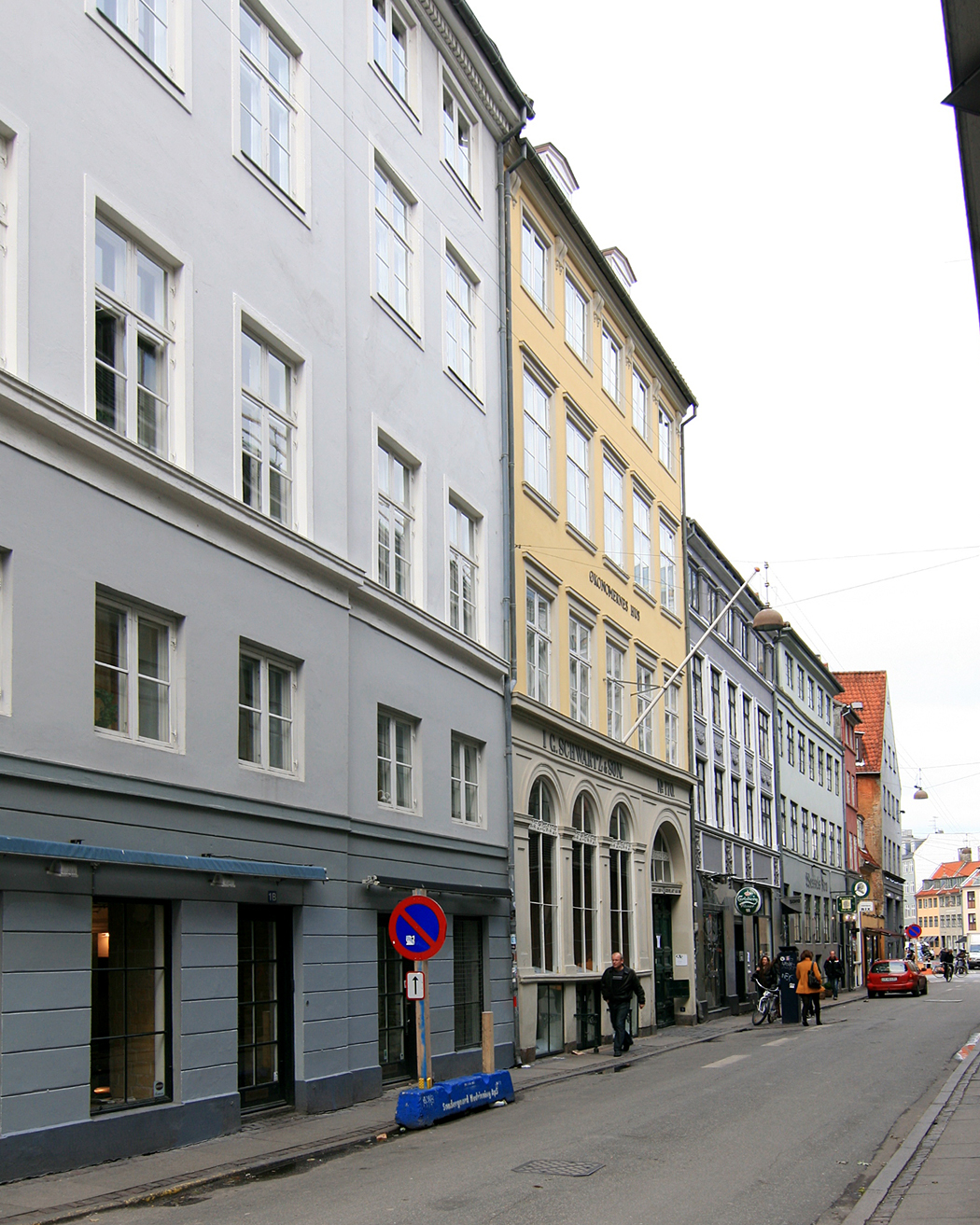 Sværtegade, København.